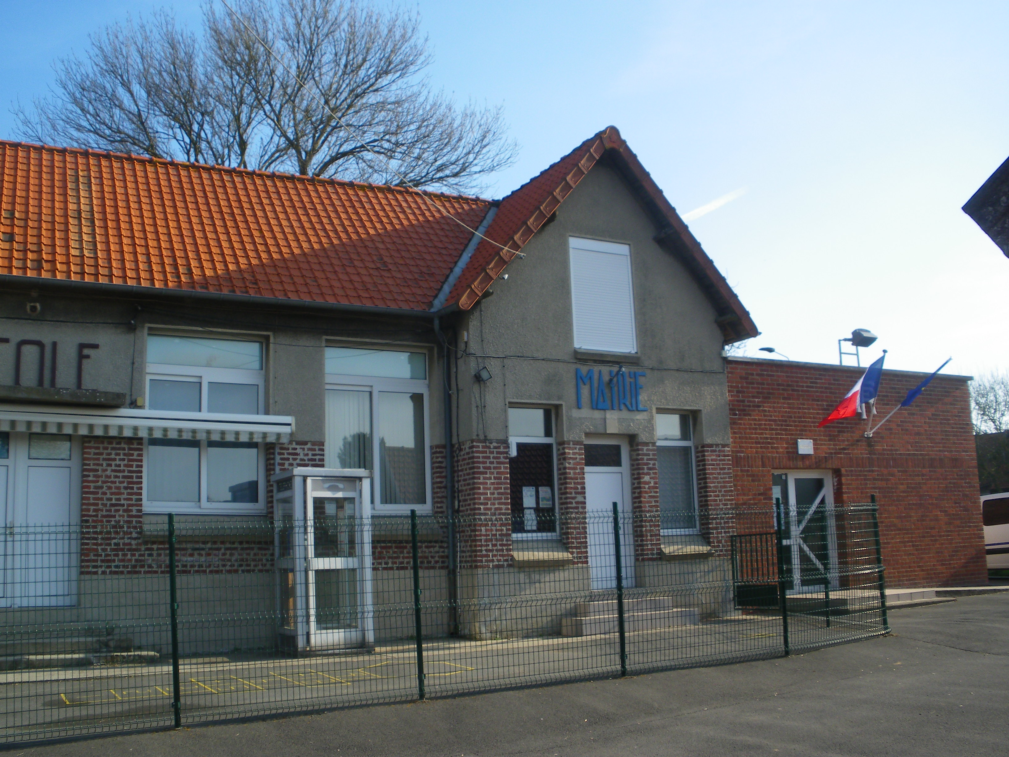 Vue de la mairie de Warlencourt-Eaucourt.